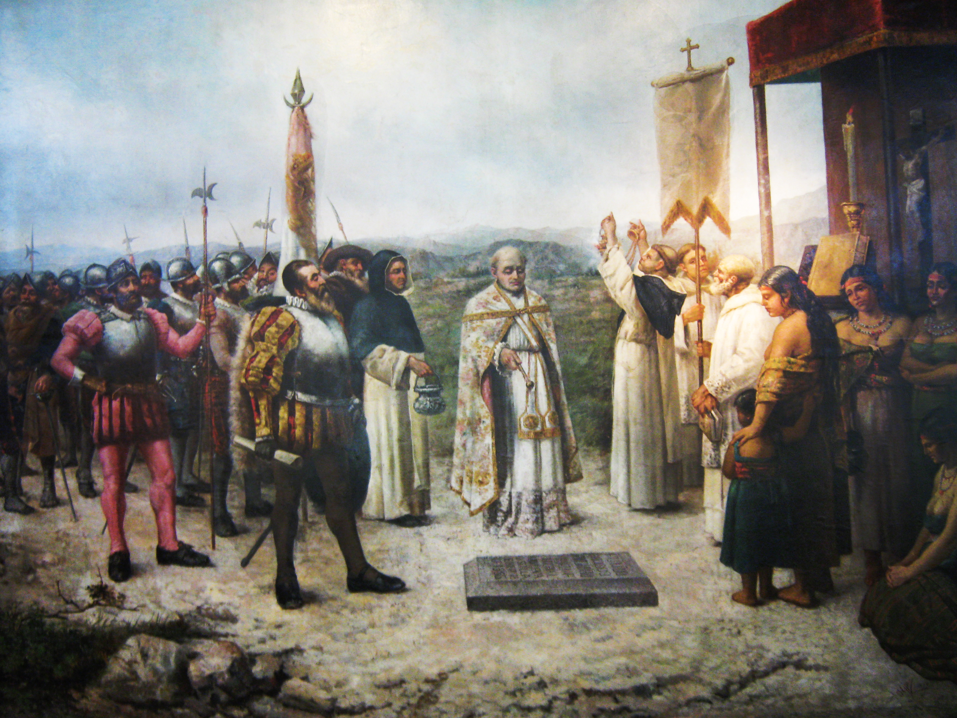 Fundacion de Lima con el conquistador francisco pizarro